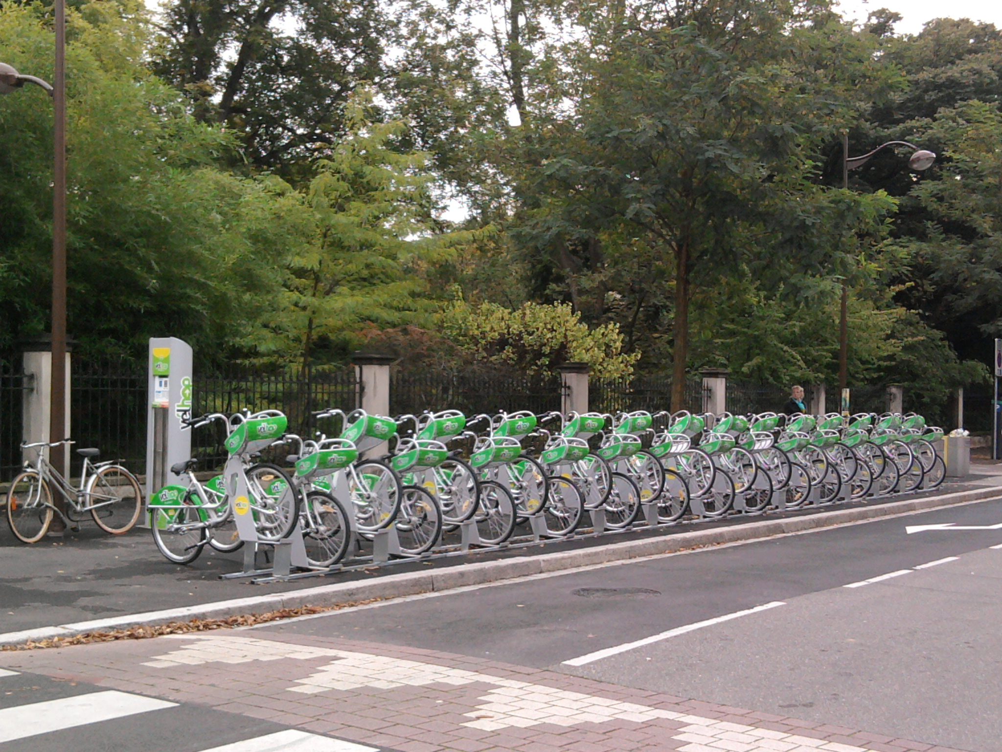 Station automatique Vélhop avec l'ensemble des vélos